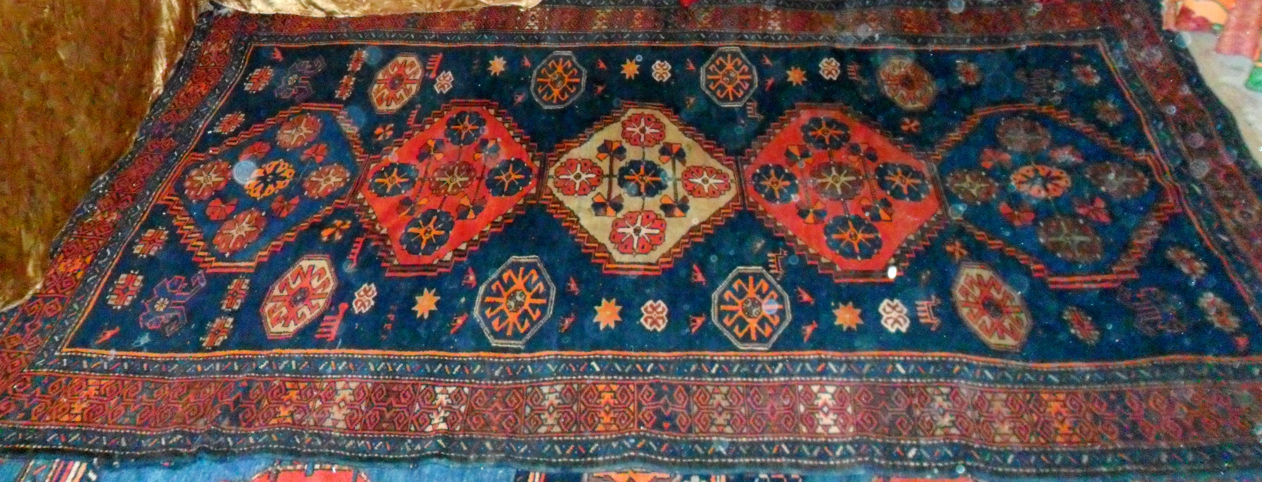 Cek xalçası (müəllif Xanımqız Muradova)